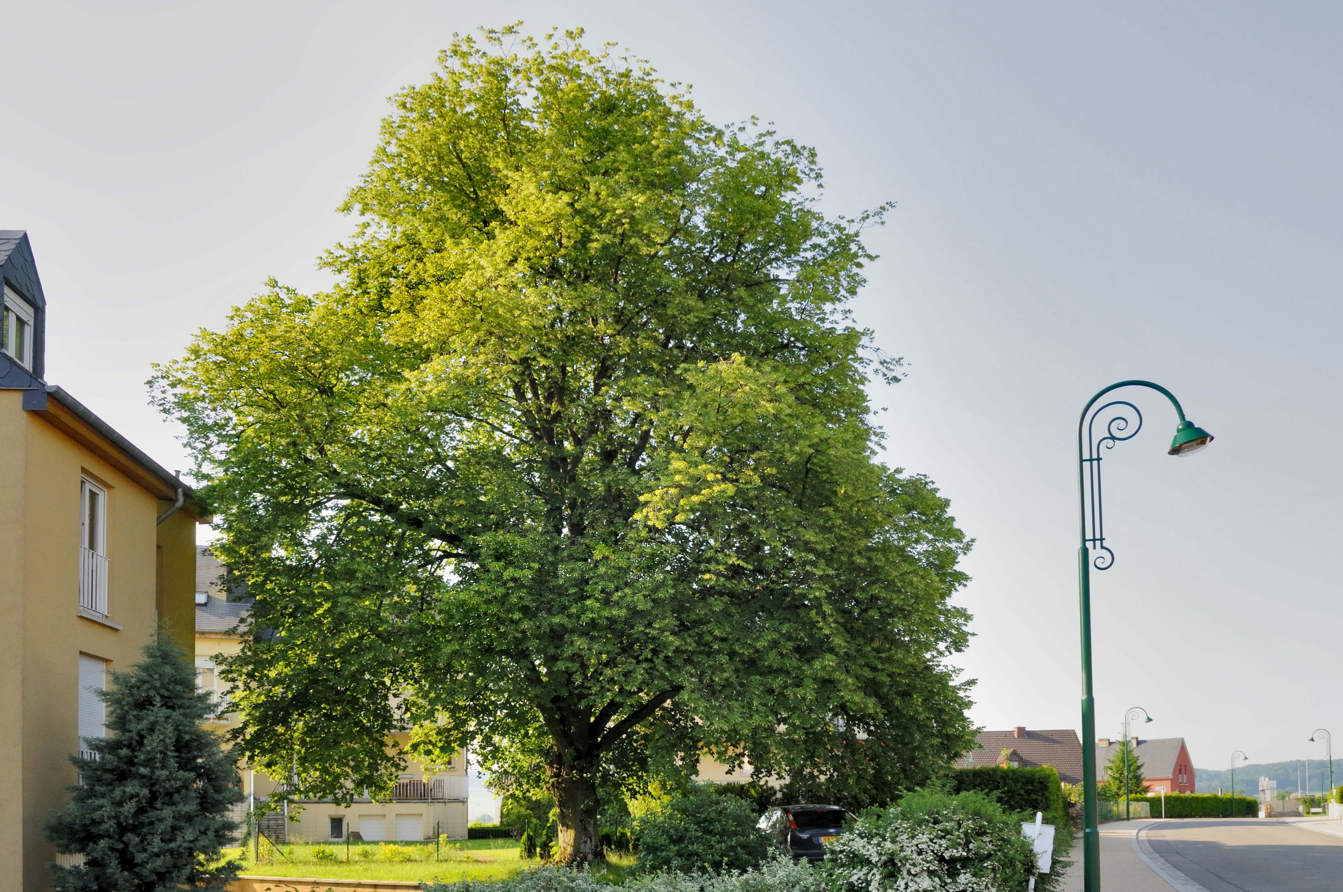 Lann zu Klengbetten.